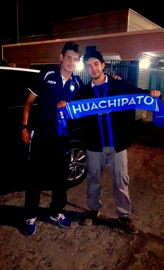 Omar Merlo dejándose fotografiar junto a un hincha acerero